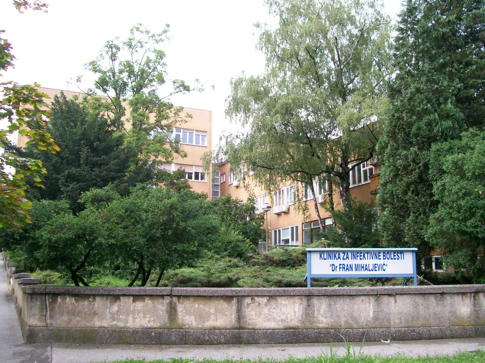 Klinika za infektivne bolesti Dr. Fran Mihaljevič, Zagreb, Mirogojska cesta